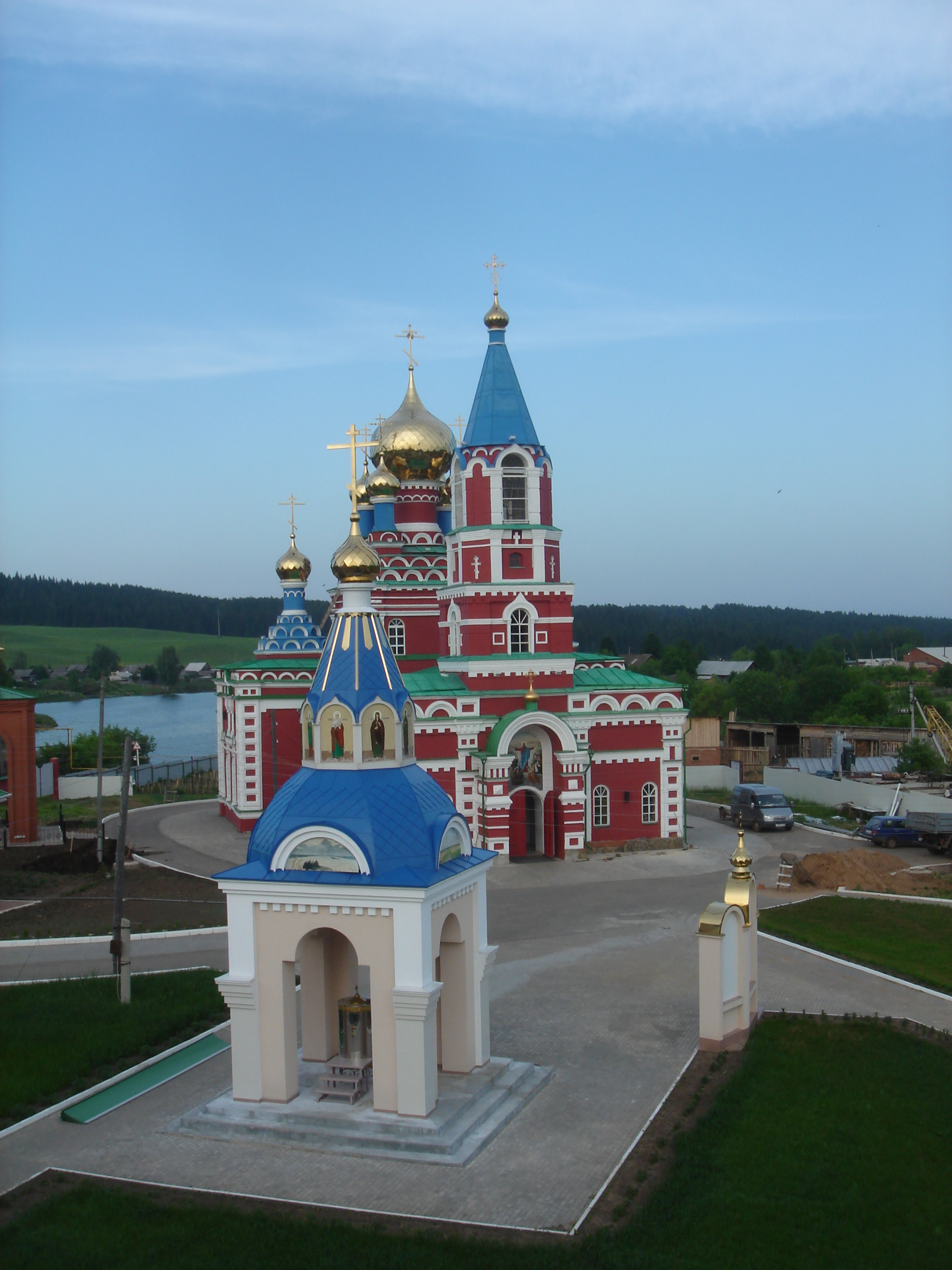 Мало-Серафимовский Дивеевский женский монастырь. Село Норья.